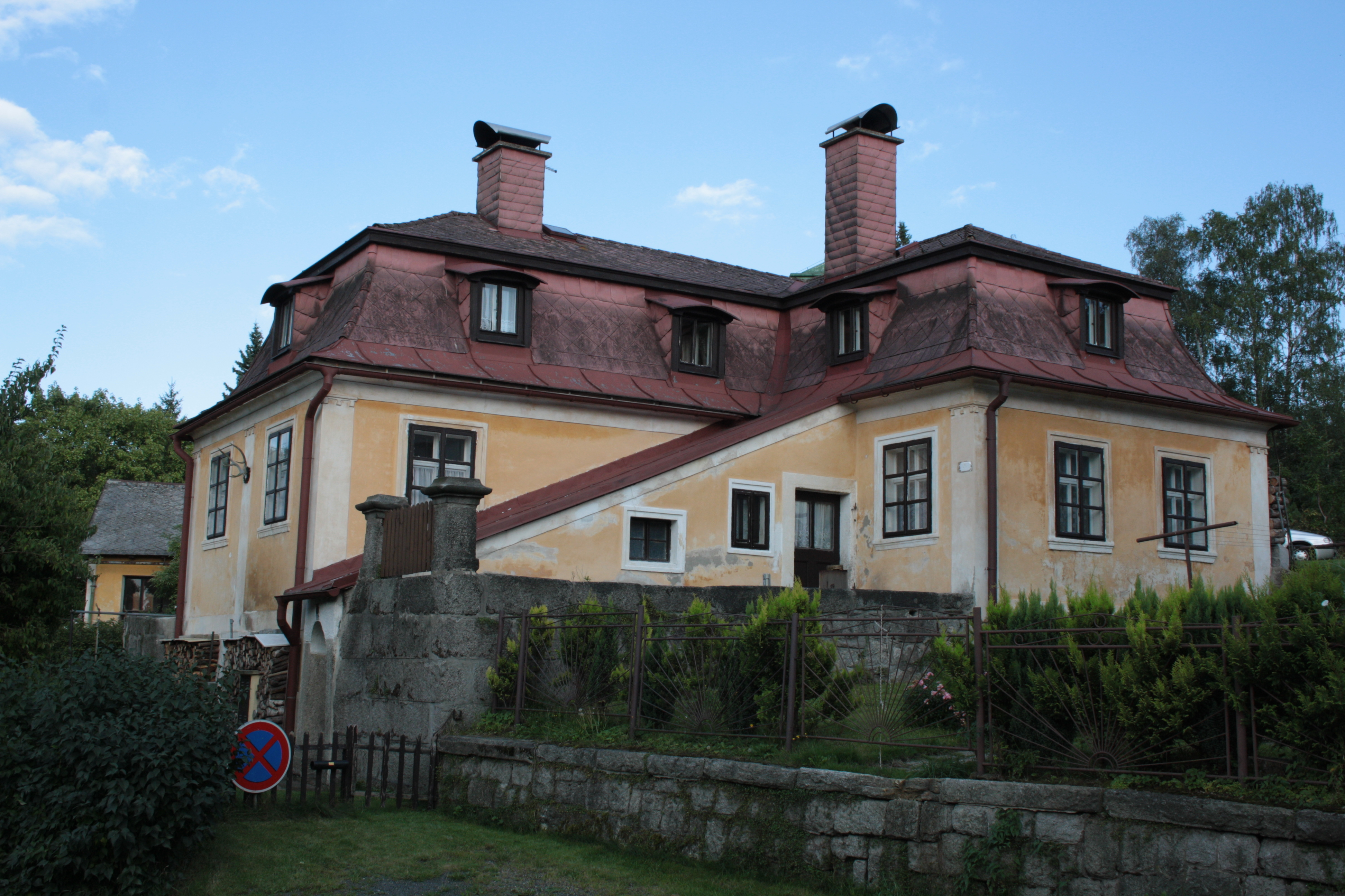 Dům číslo popisné 117 v Lázních Libverdě.